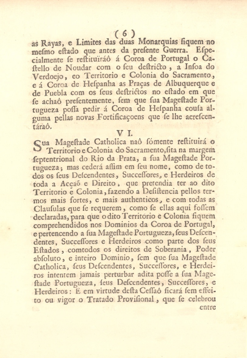 Tratado de Pax entre o muito alto e muito poderoso principe D. Joaõ o V, Pella graça de Deus Rey de Portugal, e o muito alto e muito poderoso principe D. Felipe V. Pella Graça de Deus Rey Catholico de Heʃpanha. Feito em Utrecht, a 6. de Fevereiro de 1715. Biblioteca Nacional de Portugal, S.C. 10614//1 P. Artigo VI, p. 6, em que se define (ou não) o "Territorio e Colonia do Sacramento", a ser devolvido a Portugal.